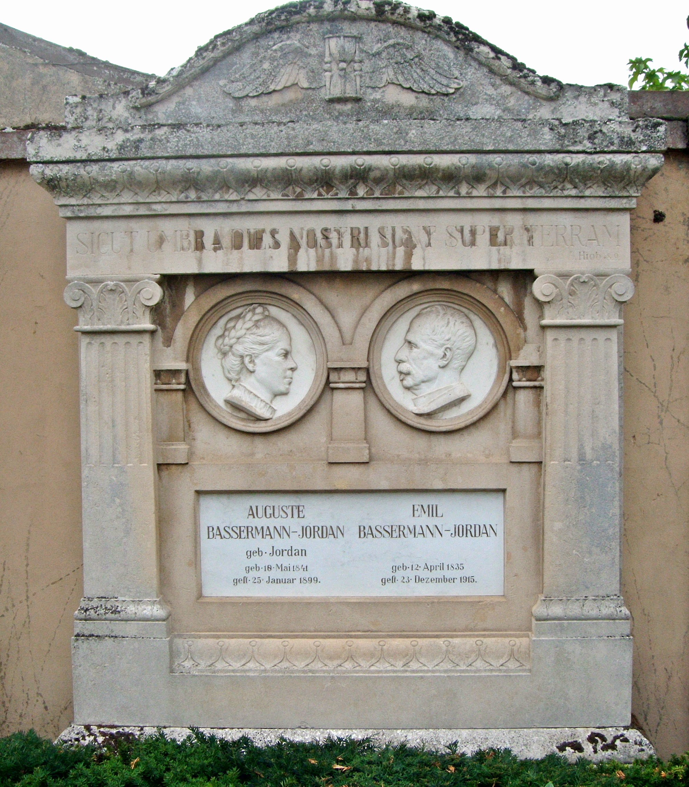 Emil Bassermann-Jordan (1835-1915), Bankier und Weingutsbesitzer, Grabmal, Friedhof Deidesheim